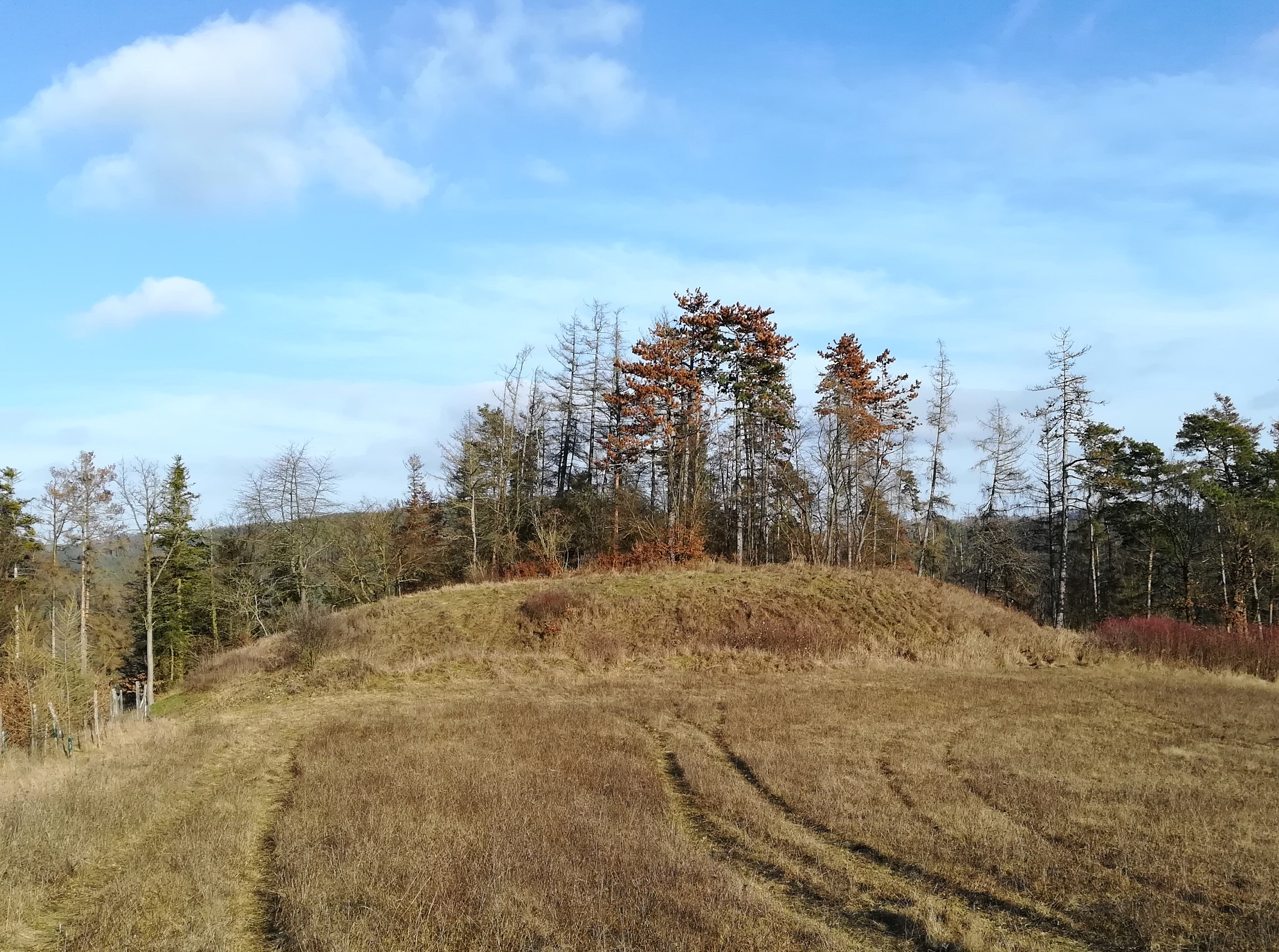 Skryje (okres Brno-venkov) - hrad Rysov, pohled od JZ